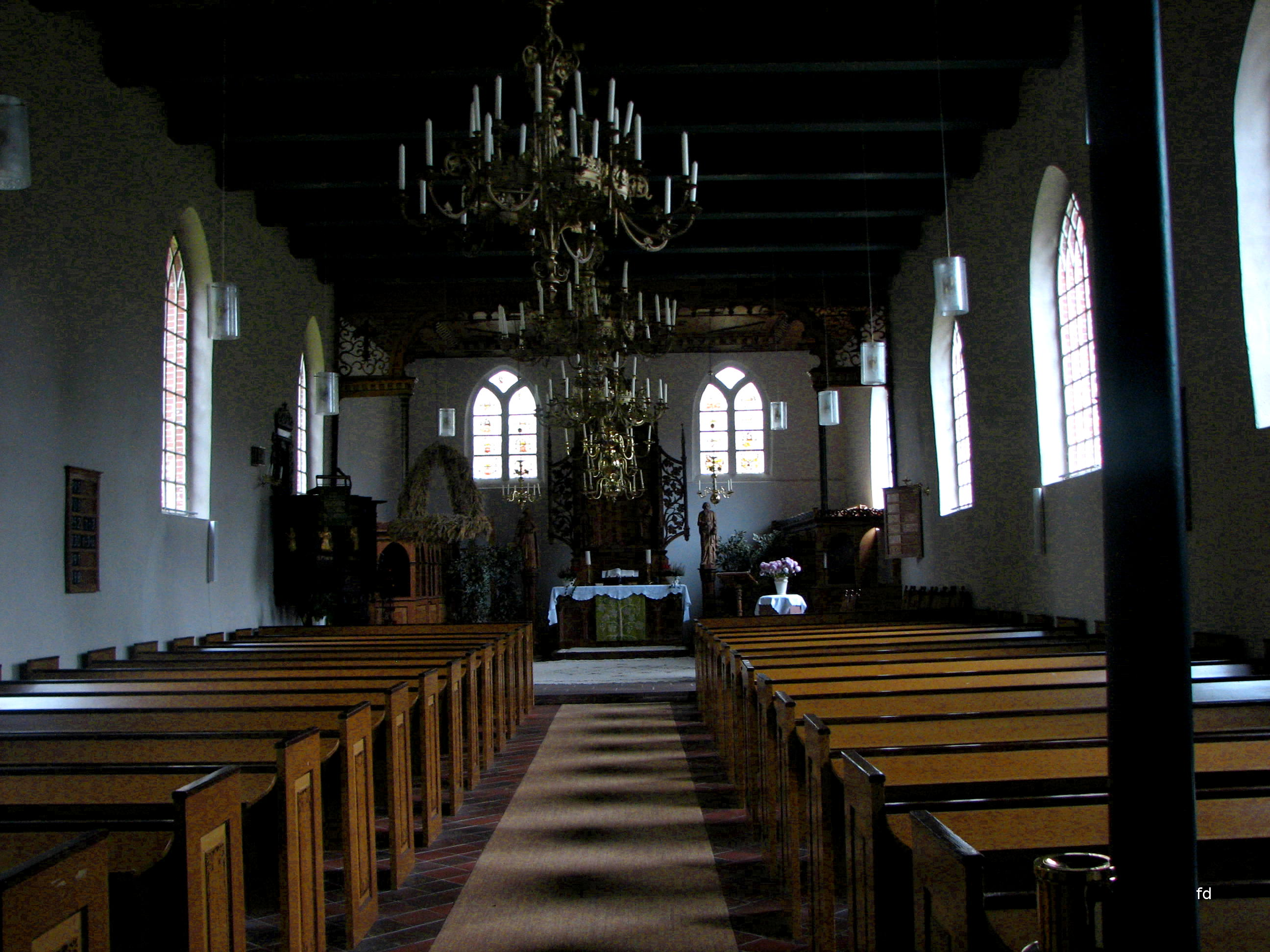 Kirche in Timmel Innenraum